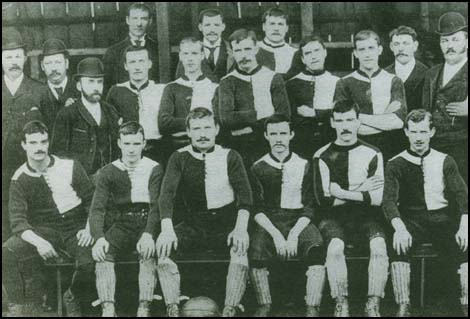 Фотография футбольного клуба «Ньютон Хит» в 1892 году